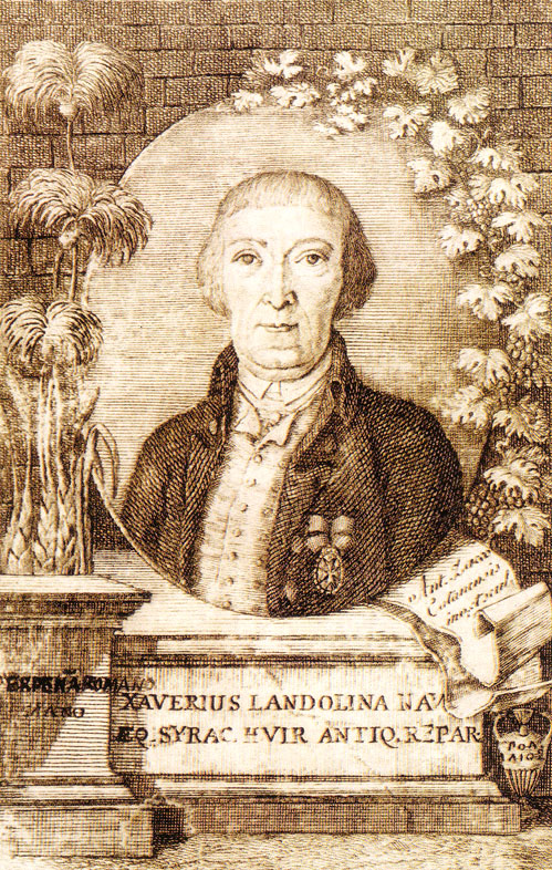 Incisione di Antonio Zacco raffigurante Saverio Landolina.